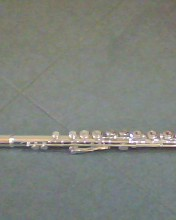 Il corpo di un Flauto traverso.